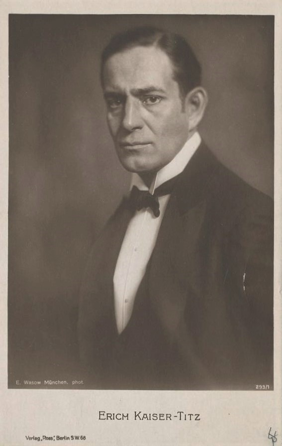 Erich Kaiser-Titz (Schauspieler). Photopostkarte von Eduard Wasow This image is a movie star postcard published by Ross Verlag in Berlin. This is image nr. 293/1 from their series. It was published ca. 1919–1924. This tag does not indicate the copyright status of the attached work. A normal copyright tag is still required. See Commons:Licensing for more information. In particular, Ross images are in the public domain in Germany only if it can be shown that the photographer (usually mentioned on the image itself) has died more than 70 years ago. Ross images that are in the public domain in Germany may still be copyrighted in the United States if they were first published later than 1922 and were still copyrighted in Germany on January 1, 1996 (i.e. if the photographer died in 1926 or later).